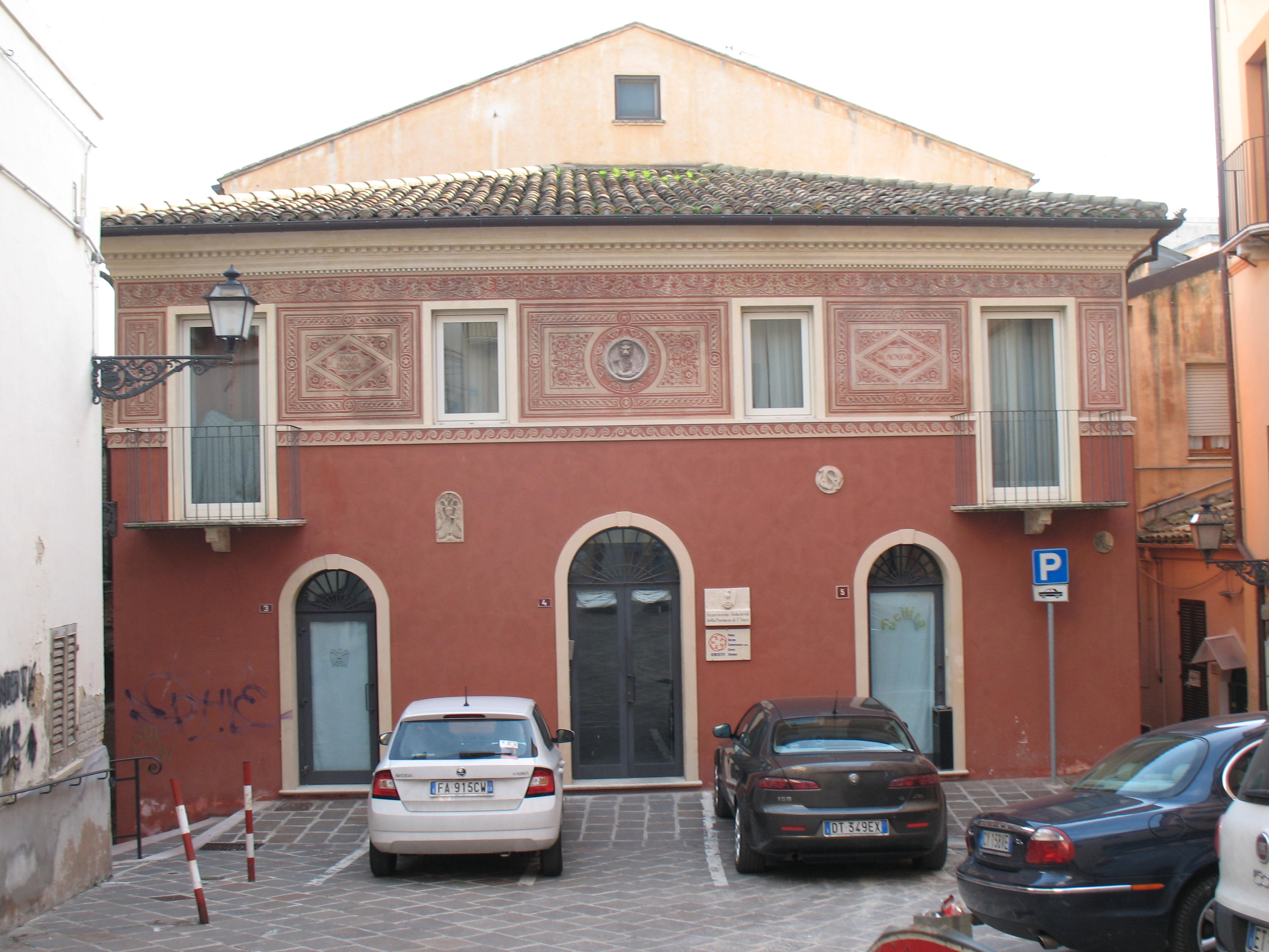 Quello che era stato un tempo il Teatro di San Ferdinando si trasformò nella sede del distretto militare di Venezia durante la Prima Guerra Mondiale.